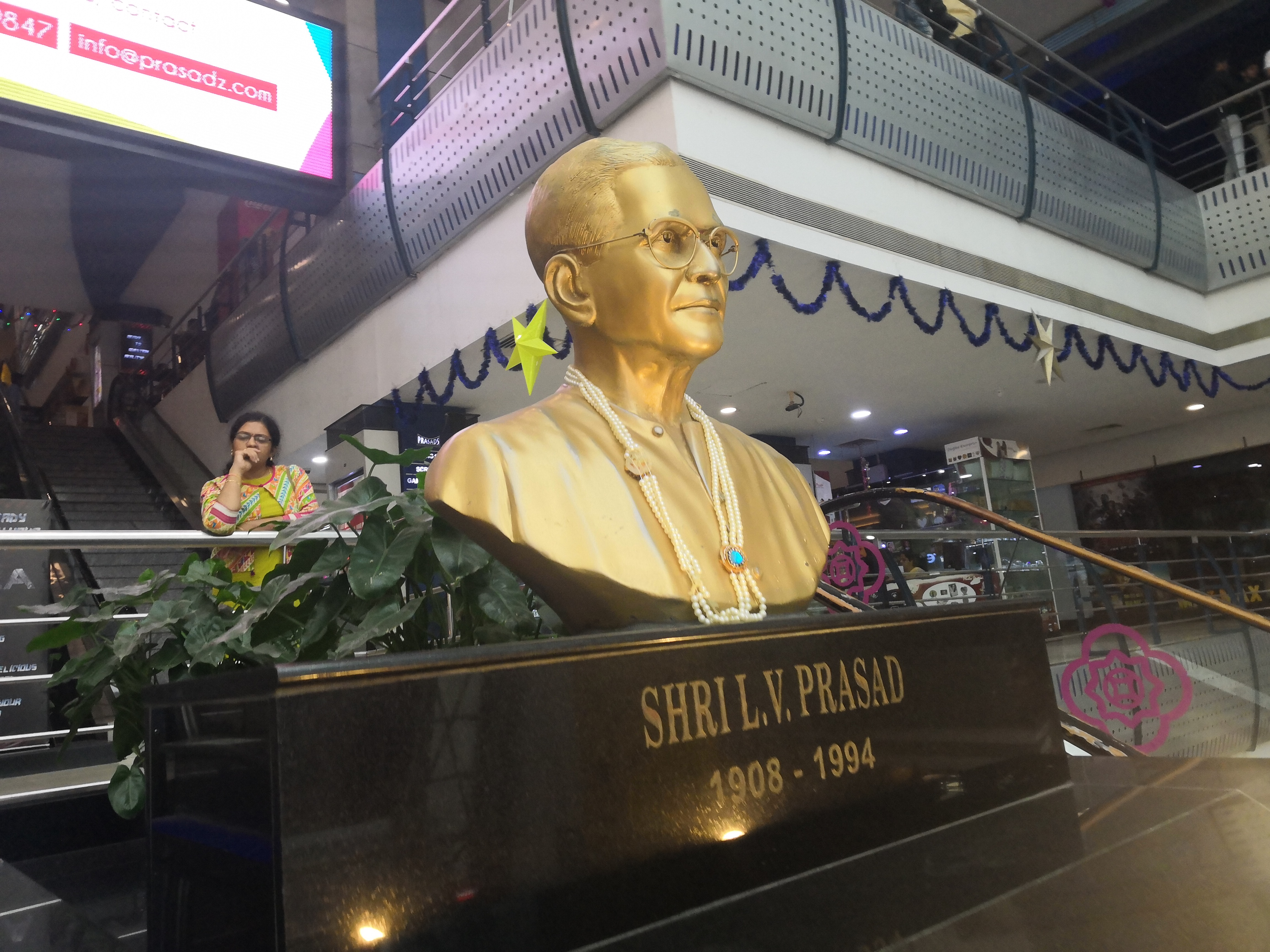 LV Prasad statue in Prasads mall